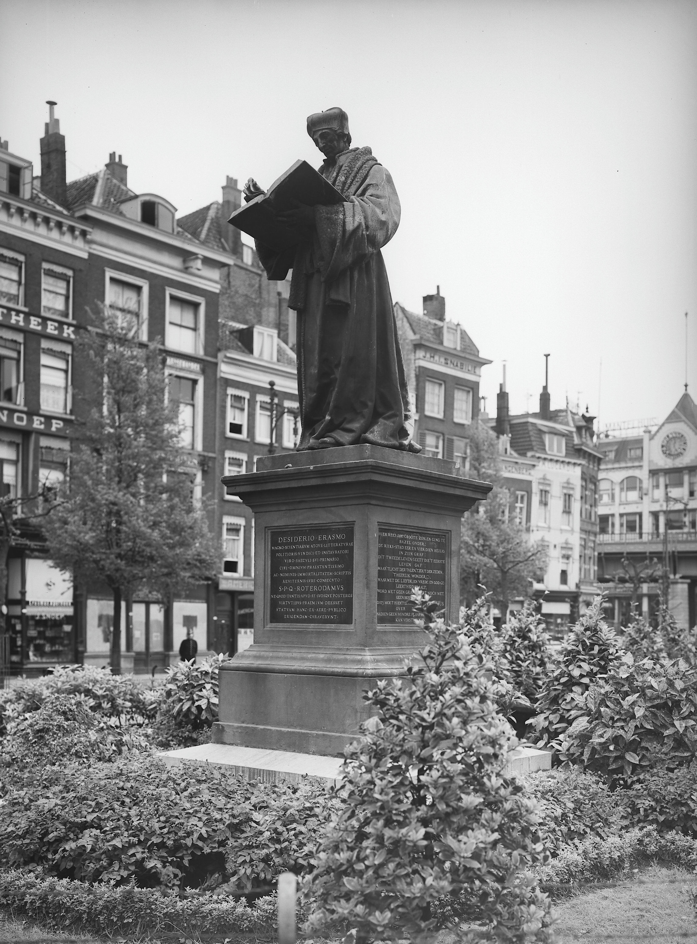 Standbeeld Erasmus